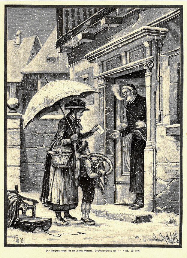 "Die Neujahrsbretzel für den Herrn Pfarrer", 1884